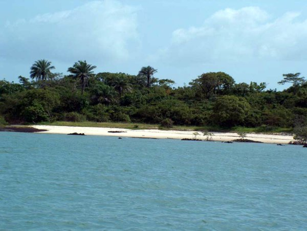 Ilhas Bijagos (Bissagos Islands)